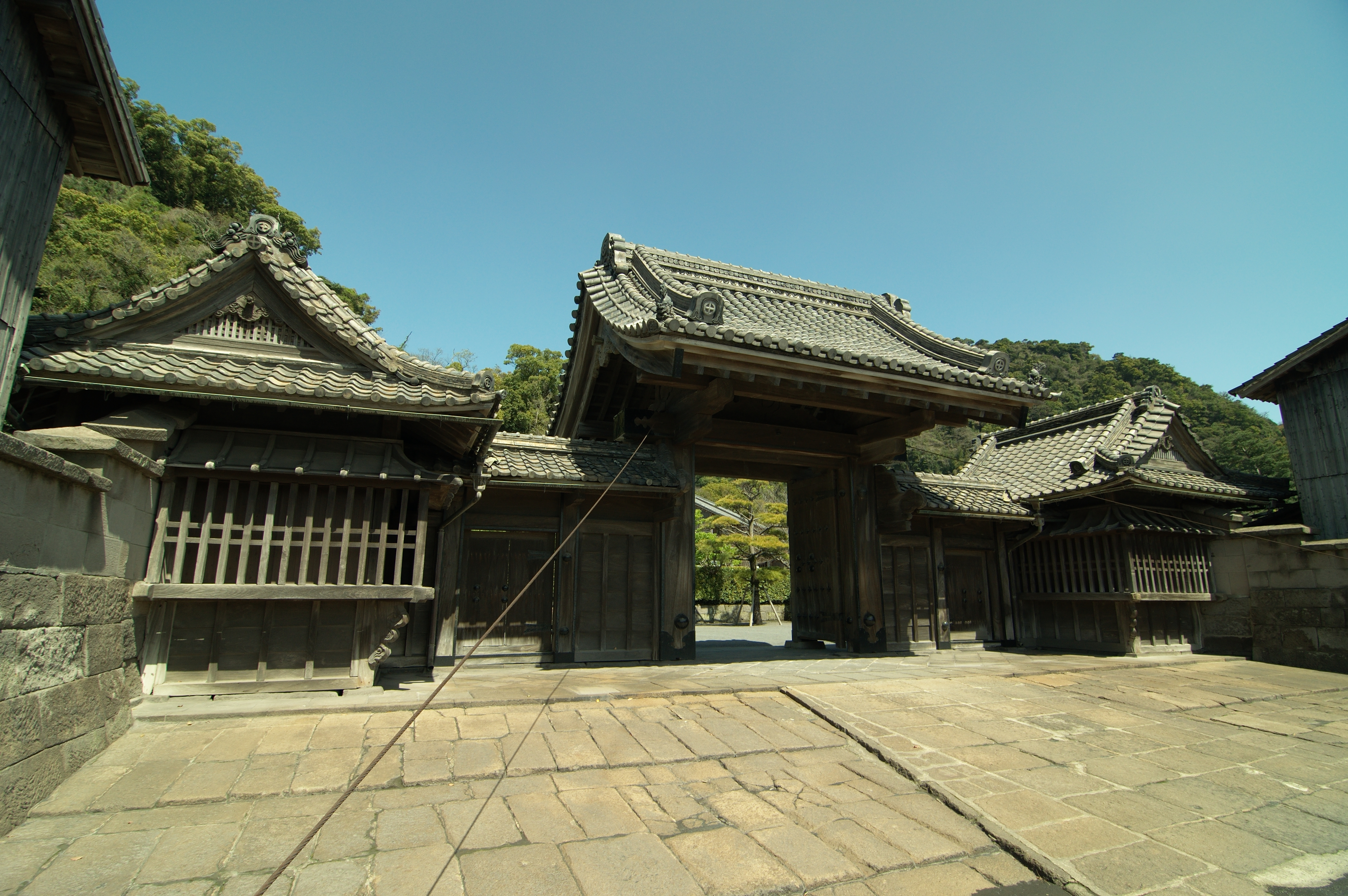 仙巌園正門